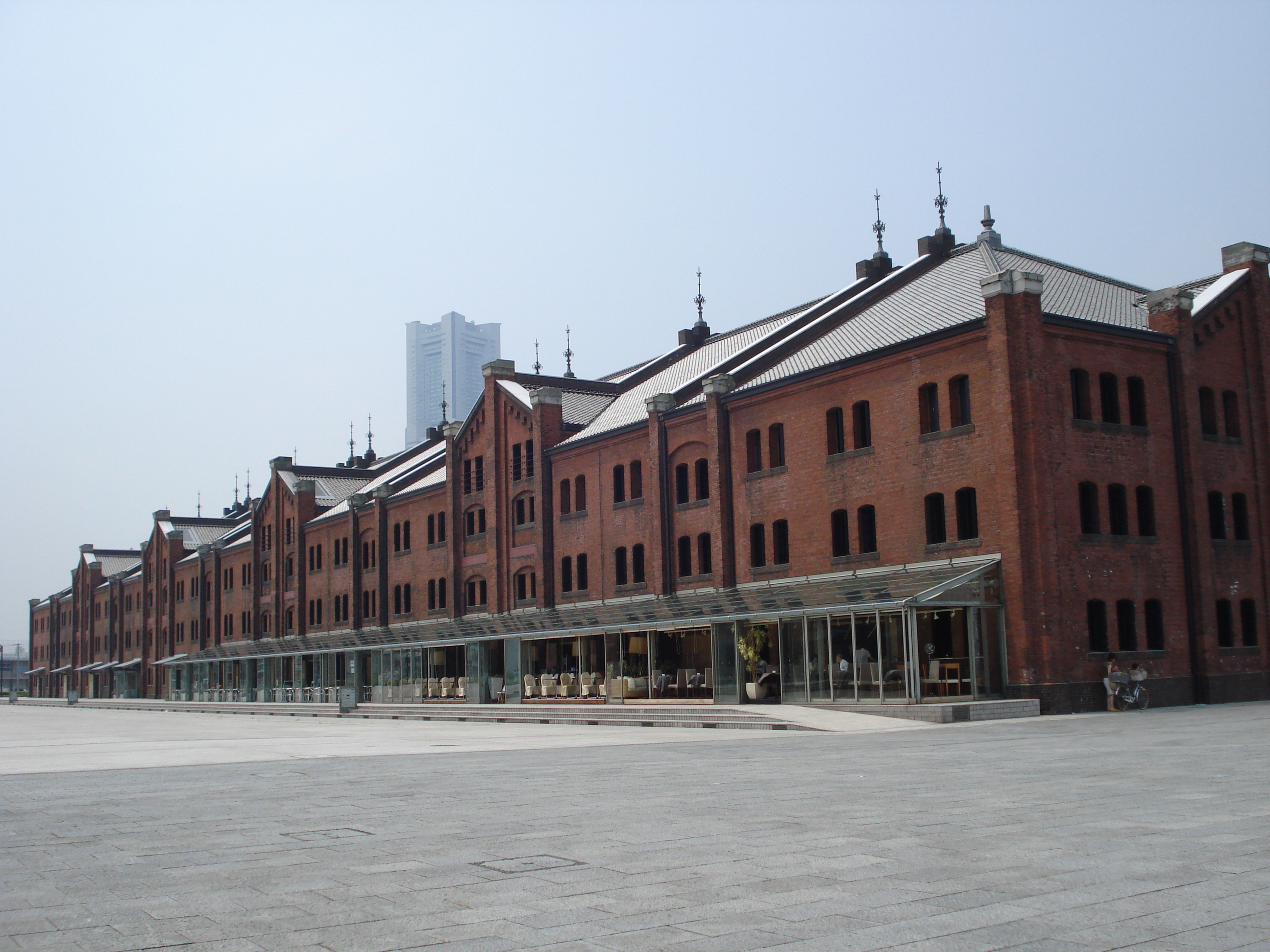 Yokohama Akarenga